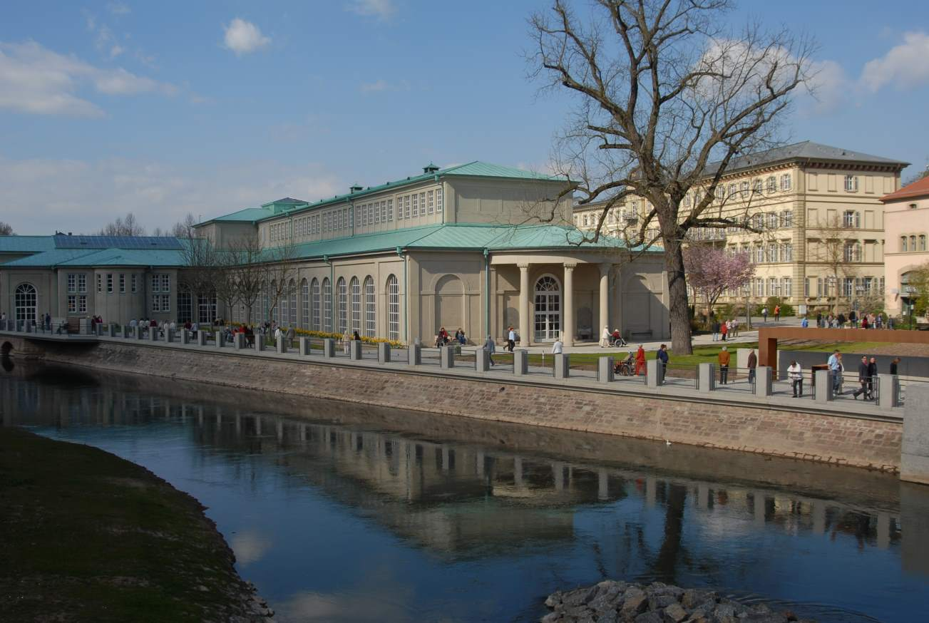 Bad Kissingen, Uferpromenade